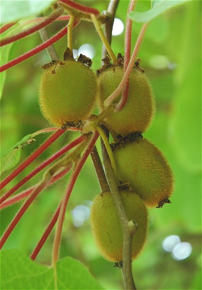 Actinidia chinensis "Ashoka" / Frucht / Botanischer Garten Berlin